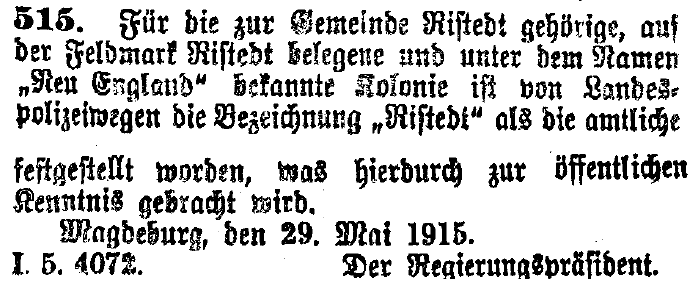 Feststellung der Schreibweise einer Kolonie namens „Ristedt“ in der Gemeinde Ristedt am 29. Mai 1915 durch den Regierungspräsidenten in Magdeburg im Amtsblatt